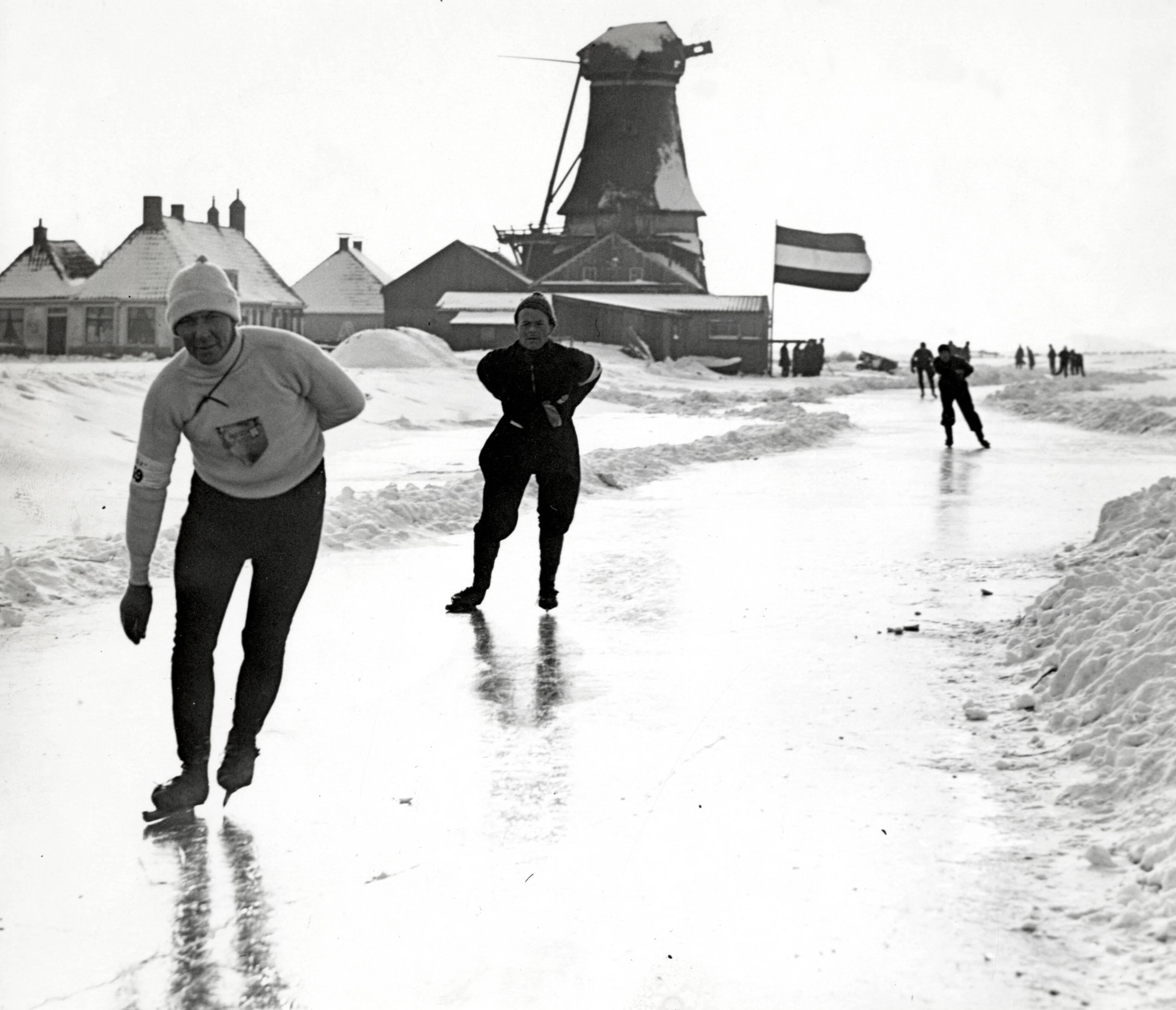 Aanloop Tweede Wereldoorlog. Schaatsen, Elfstedentocht 1940, Bauke de Vries en F.J. van den Berg komen te Vrouwbuurtstermolen aan. Op de achtergrond een windmolen zonder wieken. Een grote driekleur(vlag) wappert in de straffe winterwind. Nederland, Harlingen, 30 januari 1940. De tweede man op de afbeelding is luitenant F. J. van der Berg uit Amersfoort, met wie de eerste man, Bauke de Vries uit St. Nicolaasga, onder dienst lag. Het was mobilisatietijd. De foto is niet genomen in Harlingen maar in Vrouwbuurtstermolen.